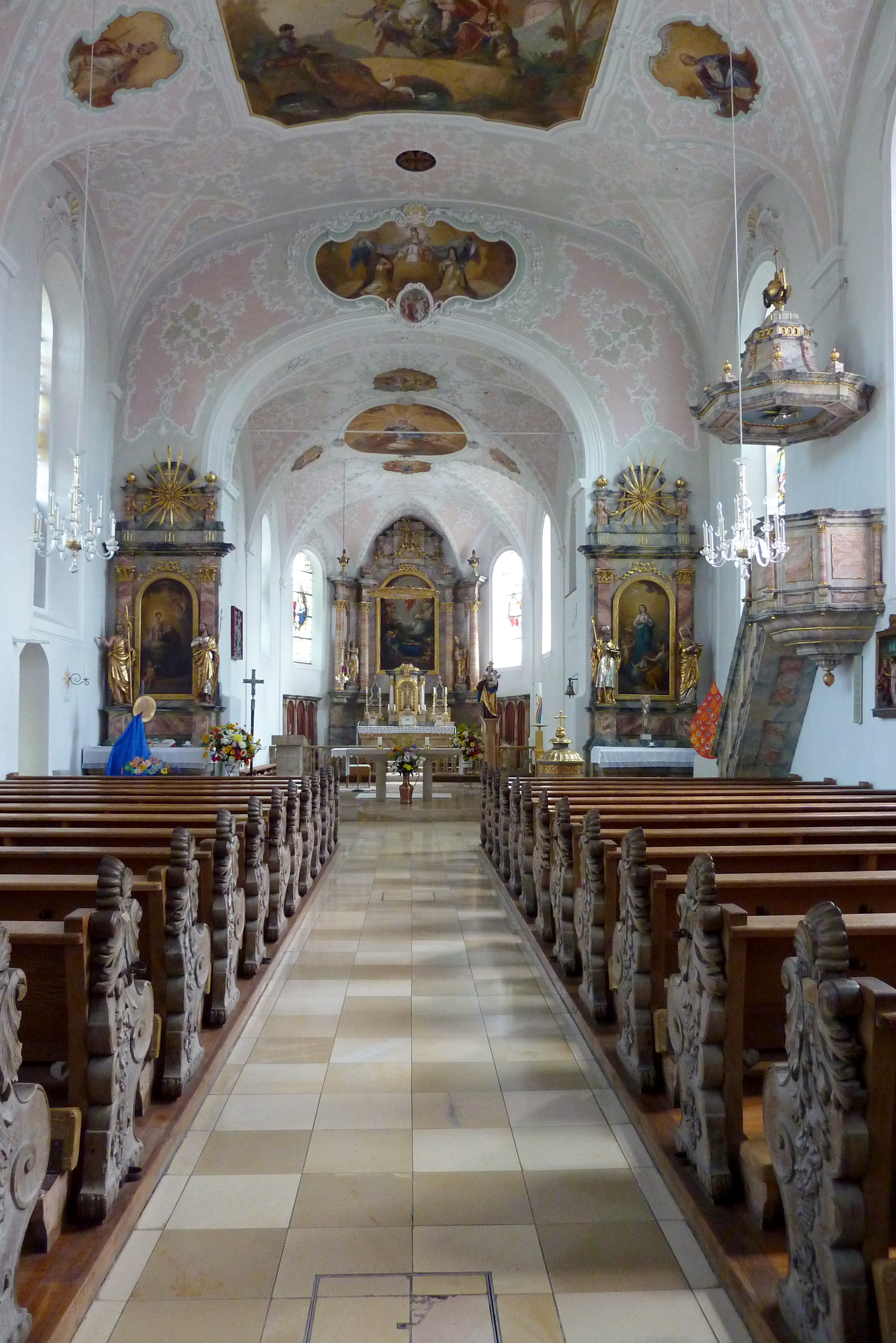 Katholische Pfarrkirche St. Martin in Zusamaltheim, einer Gemeinde im Landkreis Dillingen an der Donau (Bayern), Innenraum mit Blick zum Chor